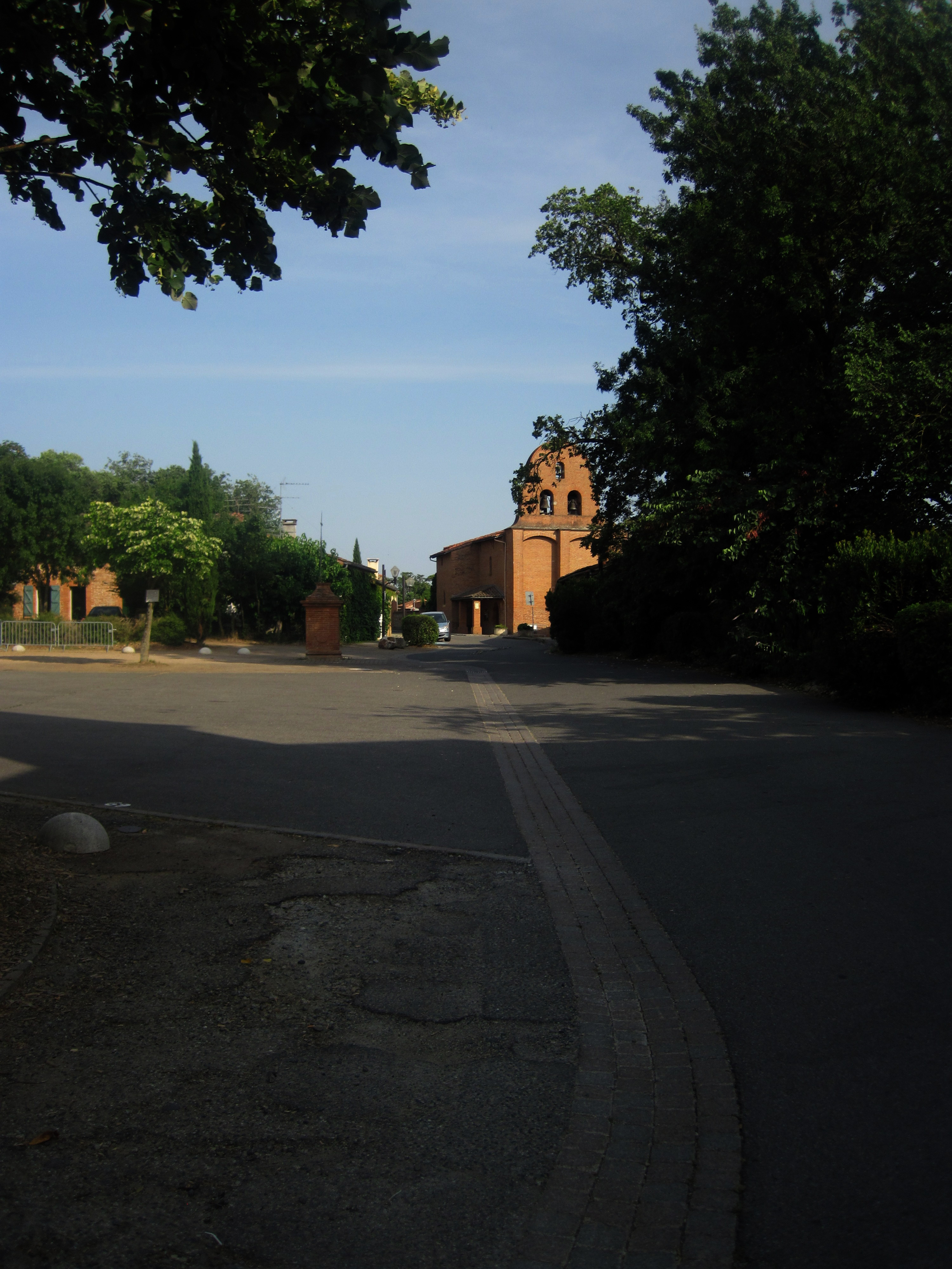 Grand-Rue de la Mairie